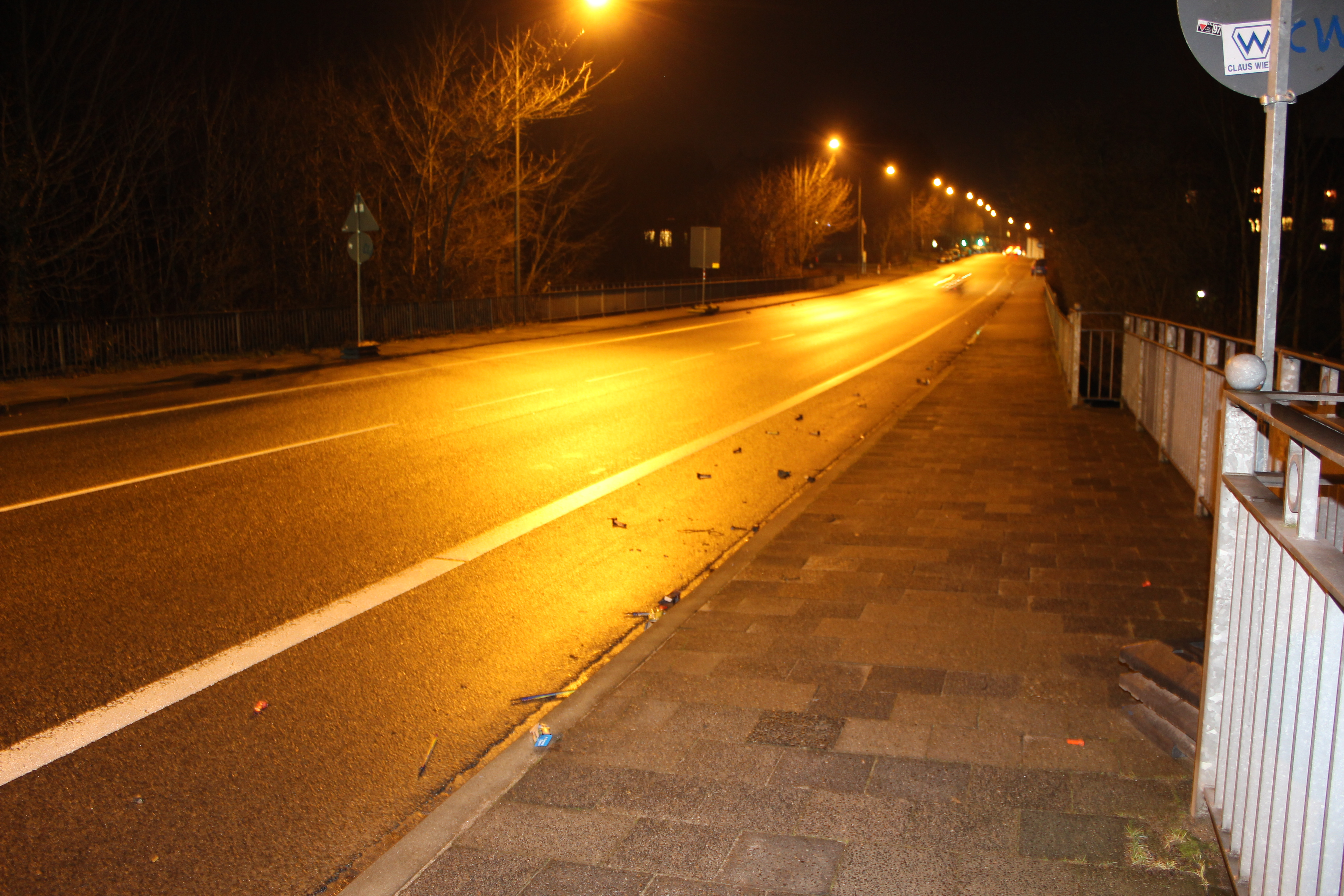 Die Teufeslbrücke, Neujahr zur nächsten Nacht (Flensburg 2014), Bild 01; mit Silvestermüll auf der Brücke